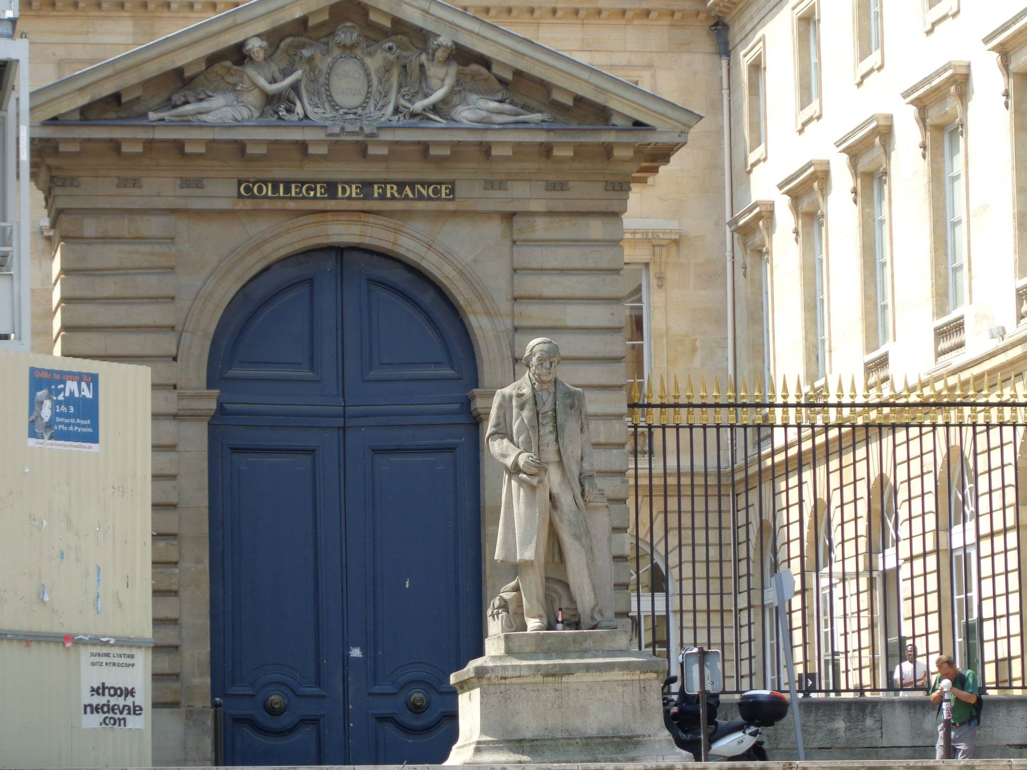 Collège de France, Porte d'entrée